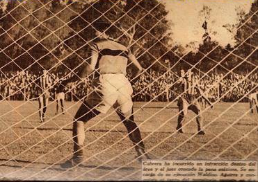 Partido del 14 de abril de 1946 por la Copa Británica, Rosario Central 4-Newell's 2. Gol de penal para Rosario Central, ejecutado por Waldino Aguirre.